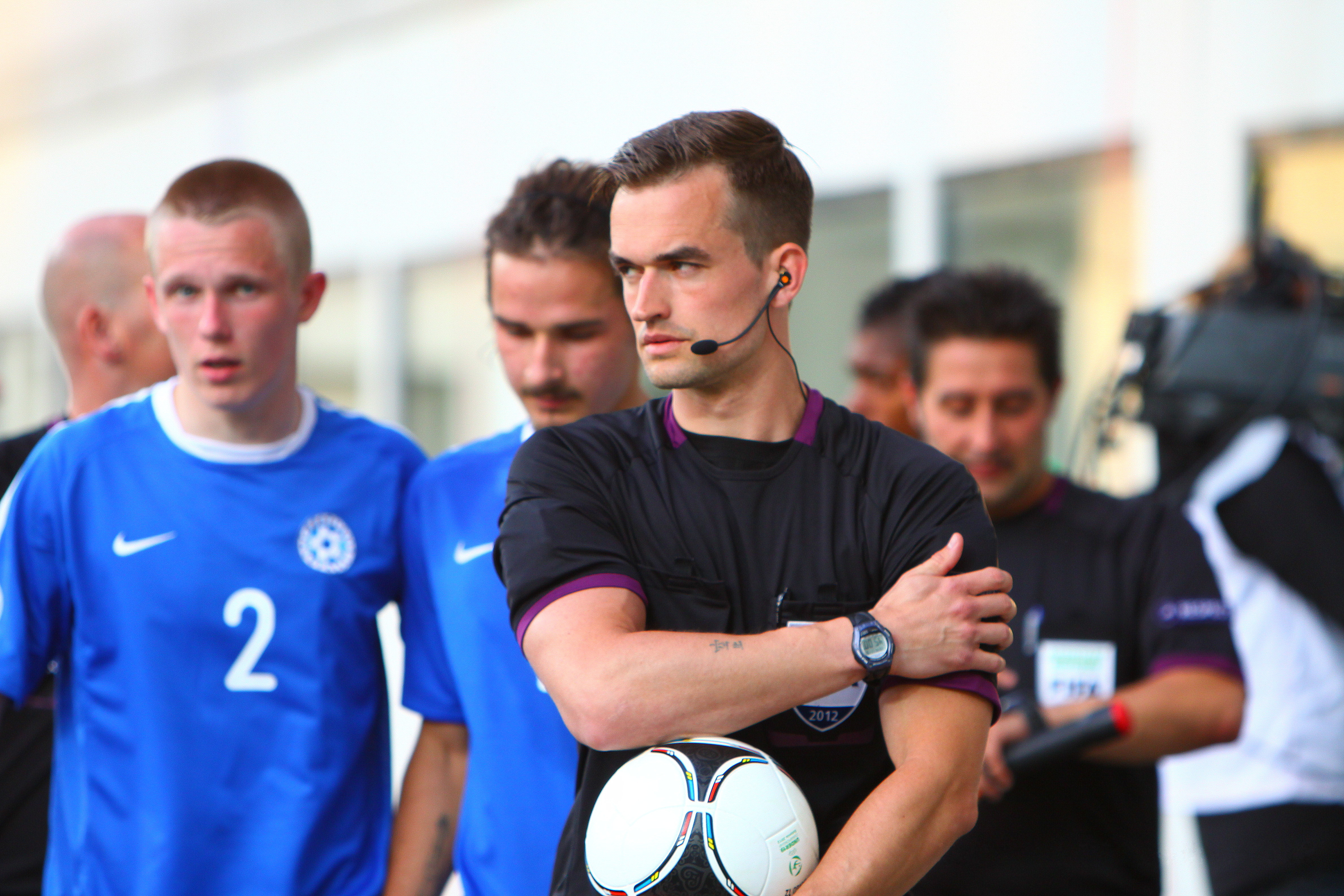 U-19 Estonia vs Portugal.